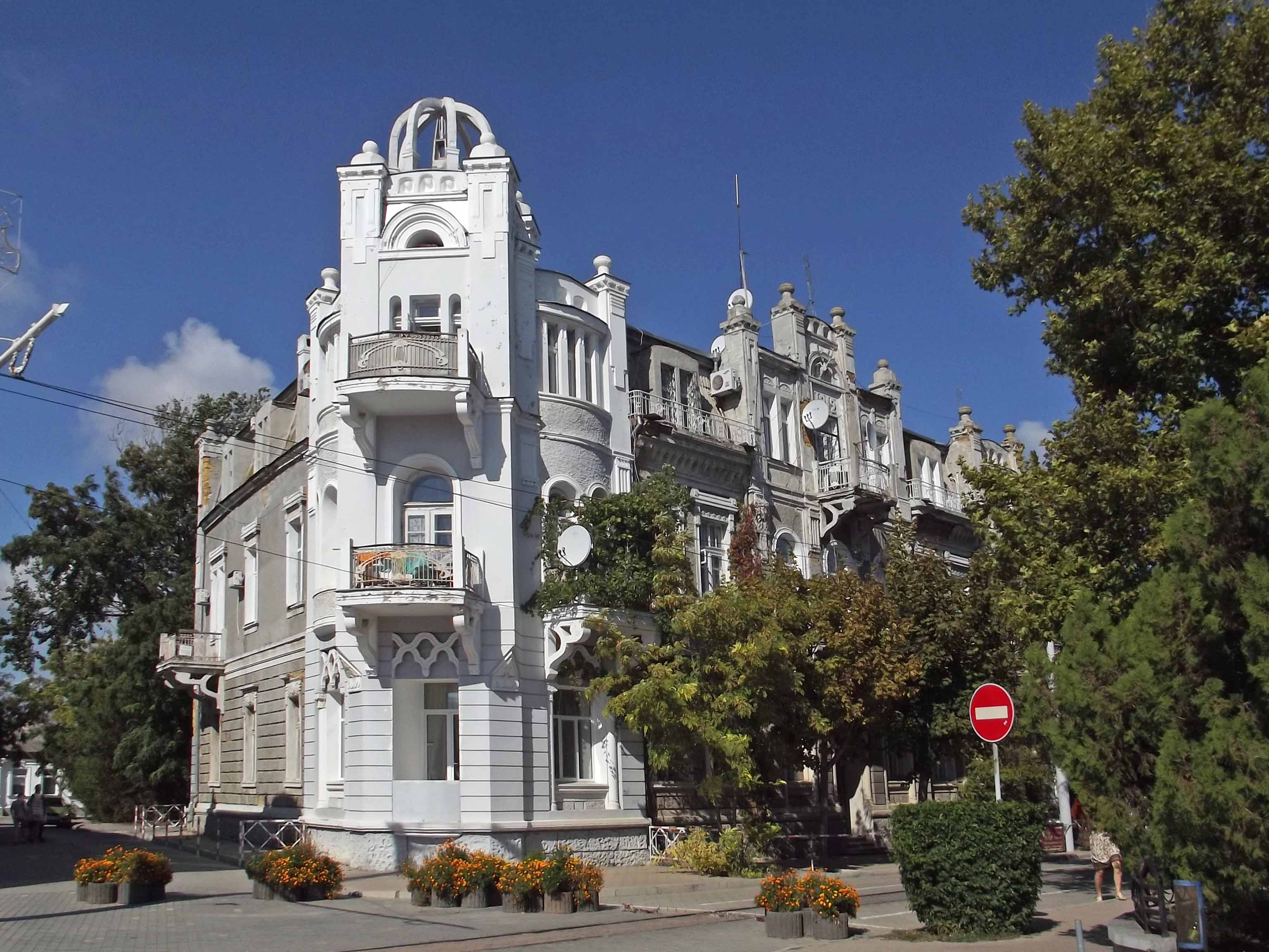 Здание на Театральной площади